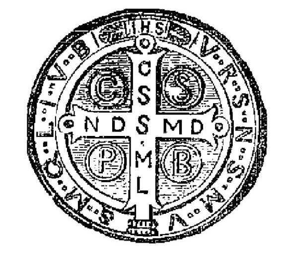 Gravure de la médaille de Saint Benoît réalisée pour les pages de titres des oeuvres de J. K. Huysmans aux éditions Stock.